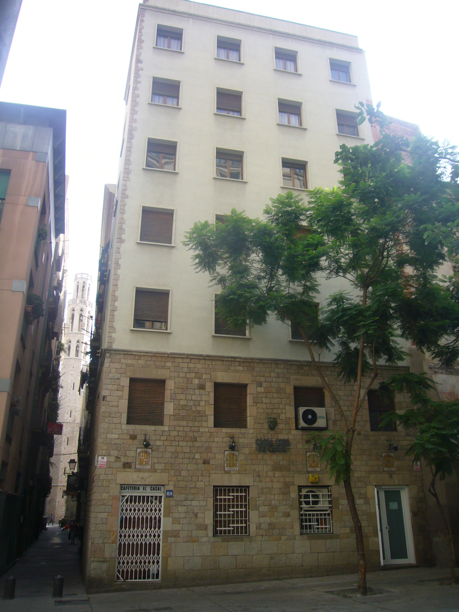 Federació de Cors de Clavé - Plaça Víctor Balaguer, 5